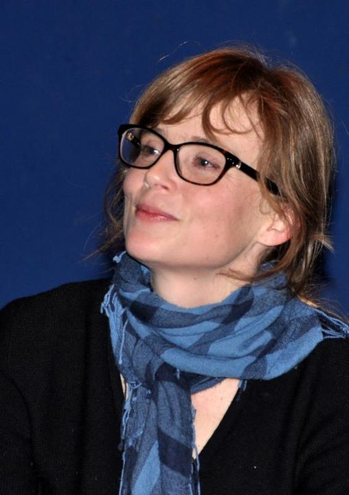 L'actrice Isabelle Carré en 2011